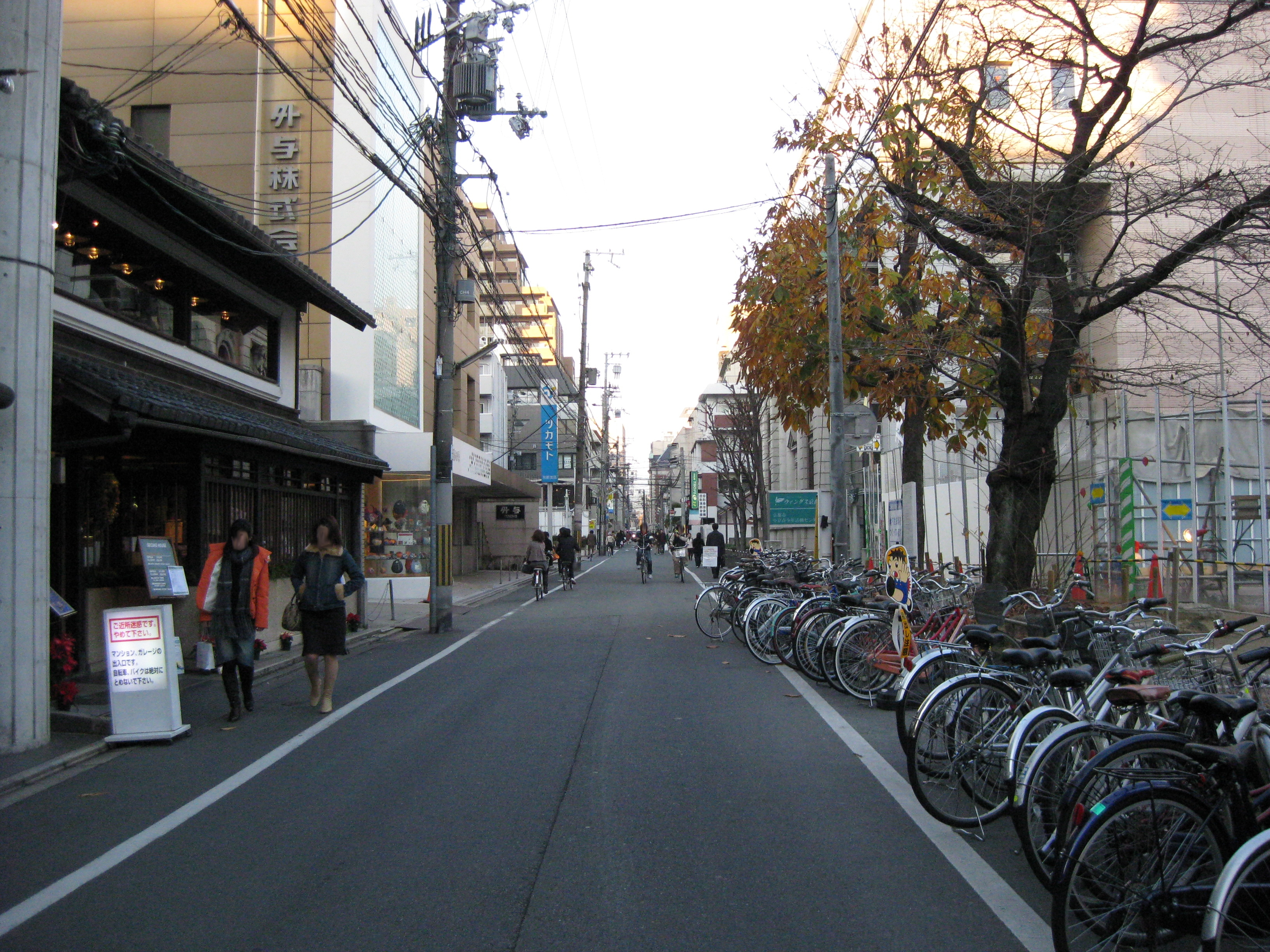 東洞院通。北方向に撮影（蛸薬師通付近）